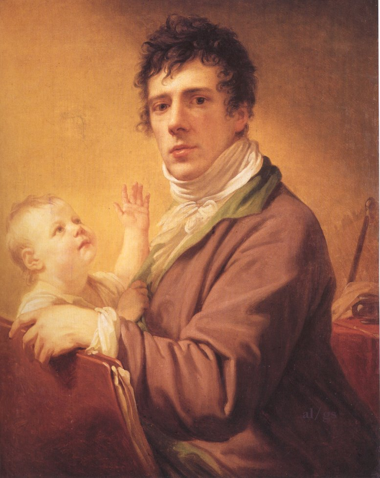 Johann Baptist Lampi der Ältere (1751–1830): Johann Baptist Lampi der Jüngere (1775–1837) mit Sohn, 1805–1815 (Tiroler Landesmuseum Ferdinandeum, Innsbruck).